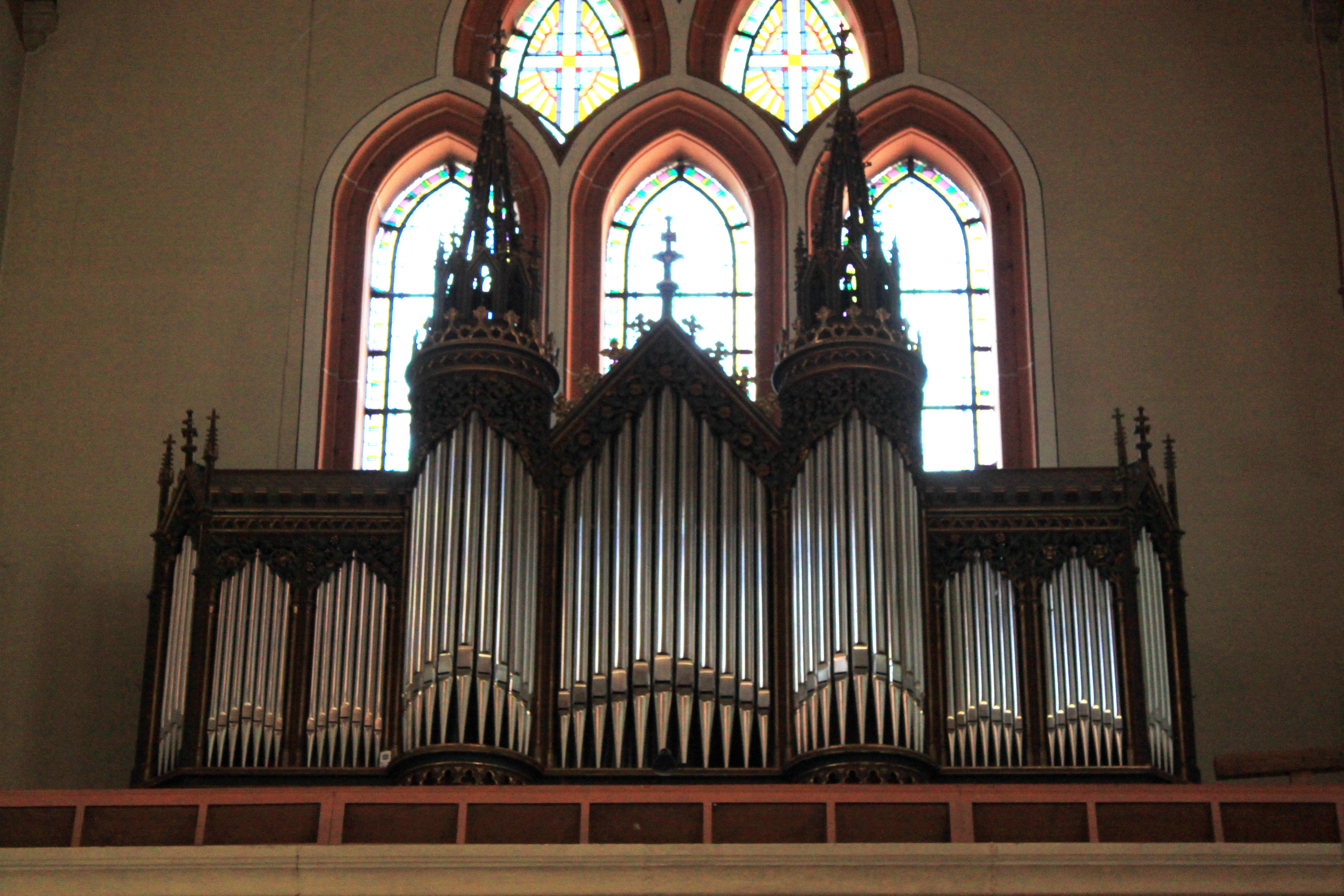 OSteinmeyer-Orgel der Pfarrkirche St. Brigitta, Wien 20, errichtet 1873.